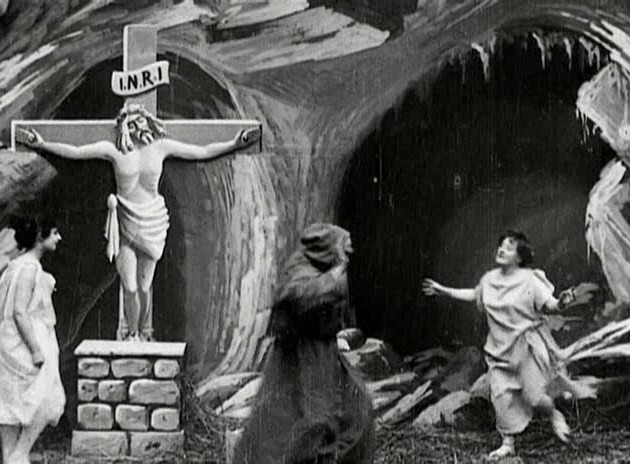 Méliès, La tentation de saint Antoine (Star Film 168, 1898)